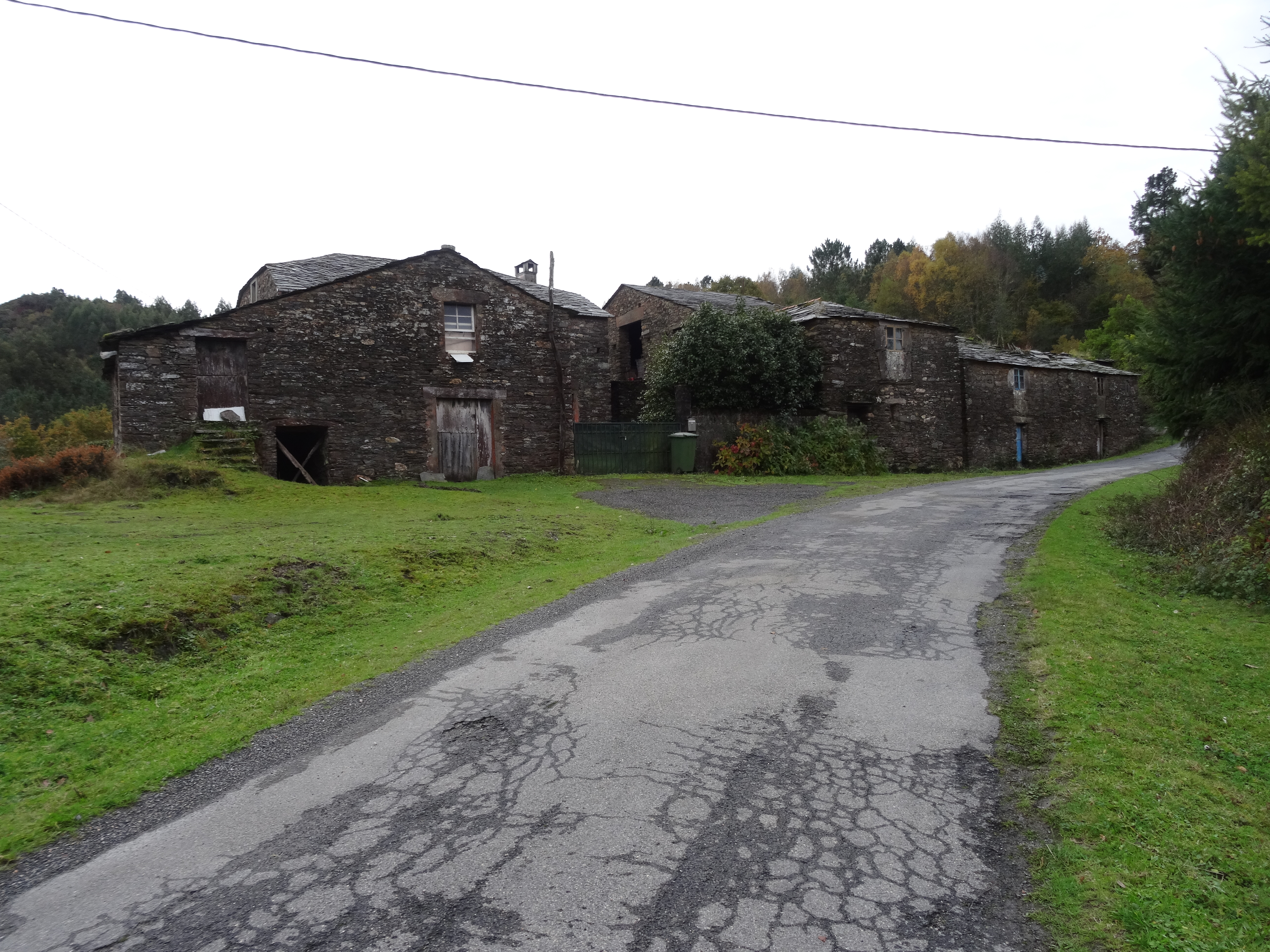 Ver título.